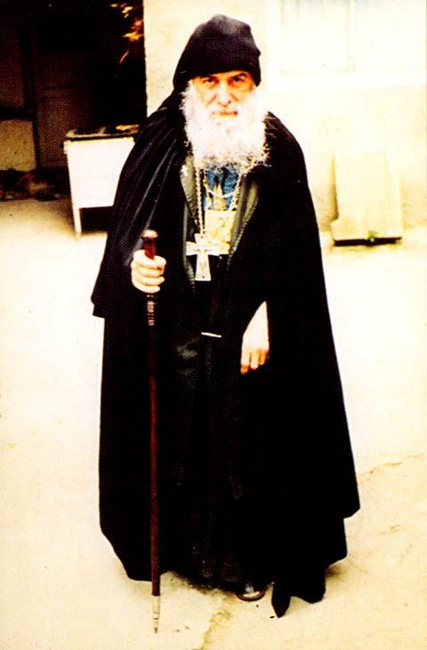 Archimandrite Gabriel Urgebadze, Orthodox Monk, Samtavro, Georgia